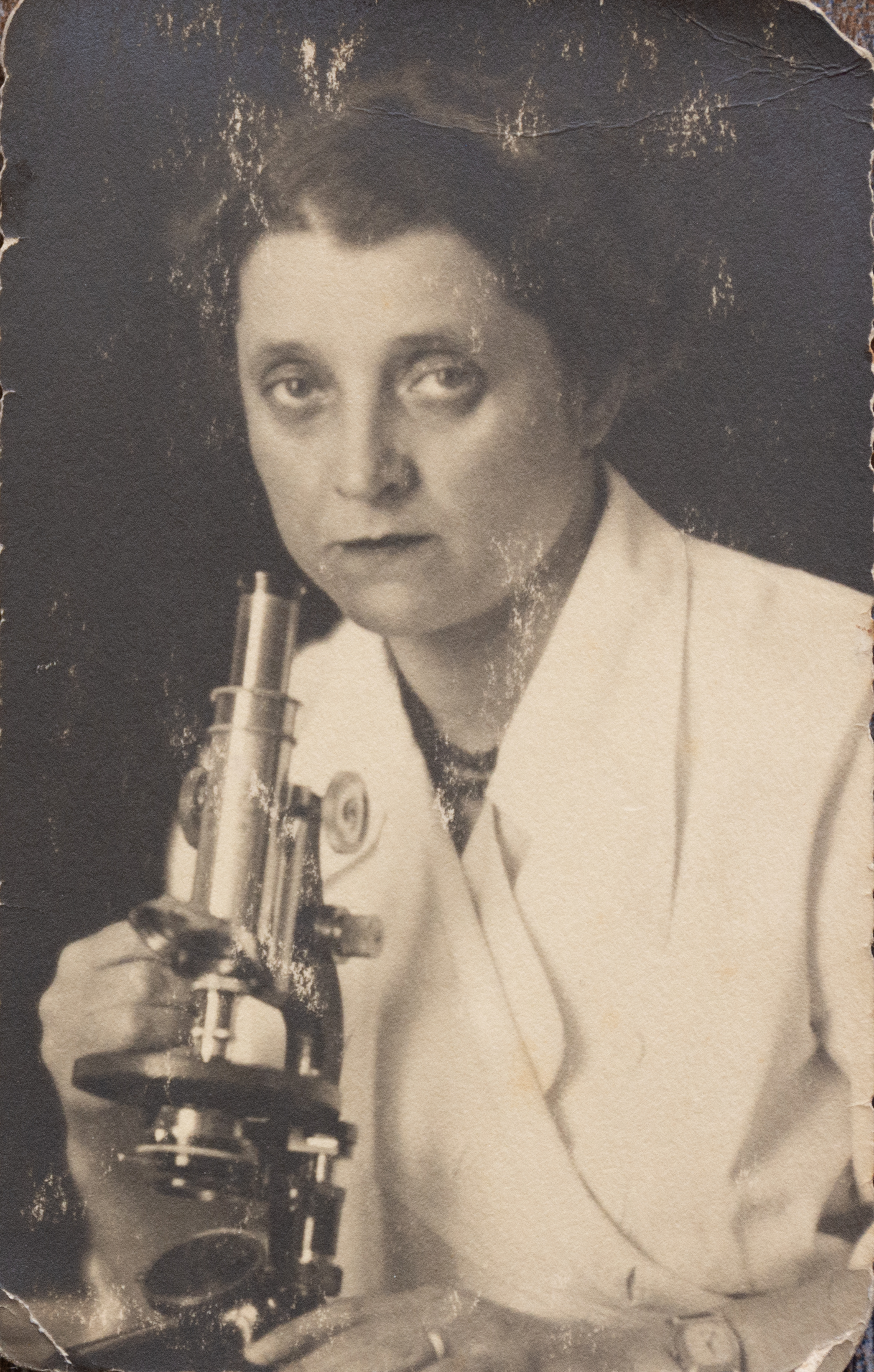 dr Smilja Kostić, 1939